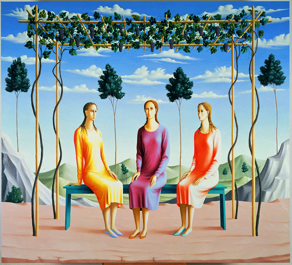 Olio su tela, 1992, di Lorenzo Bonechi